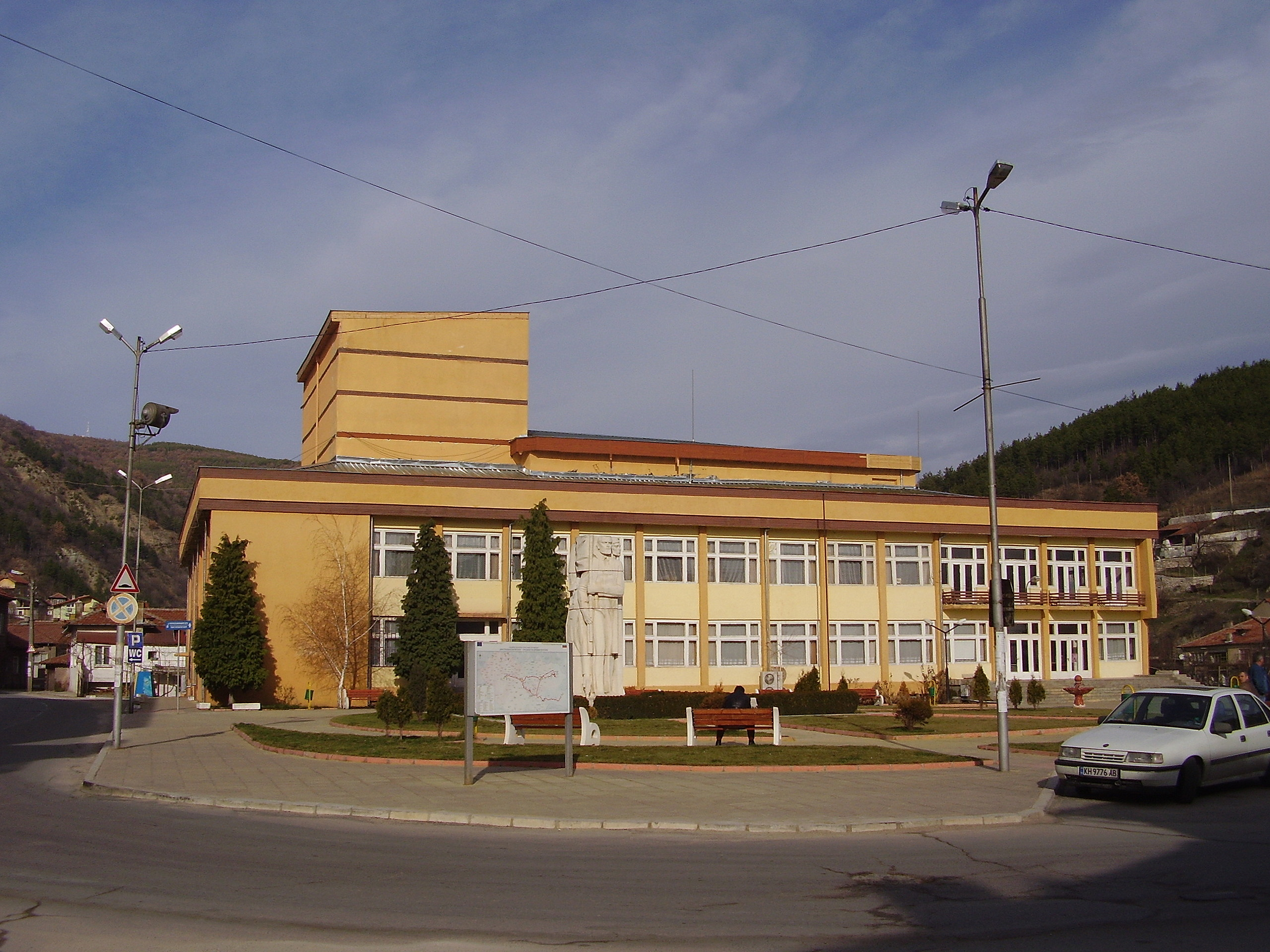 Гр.Бобошево - центъра